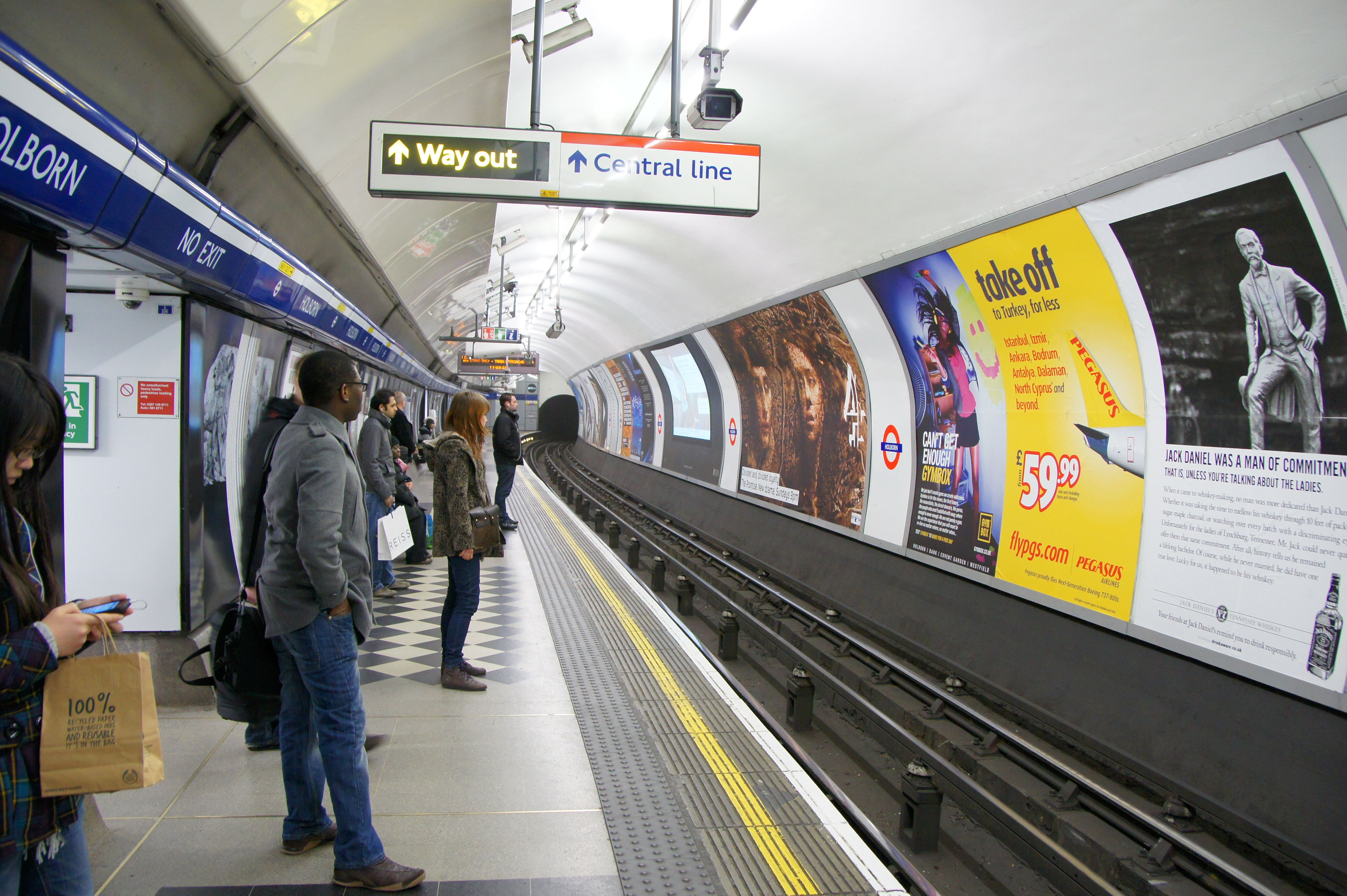 HOLBORN 050211 CPS